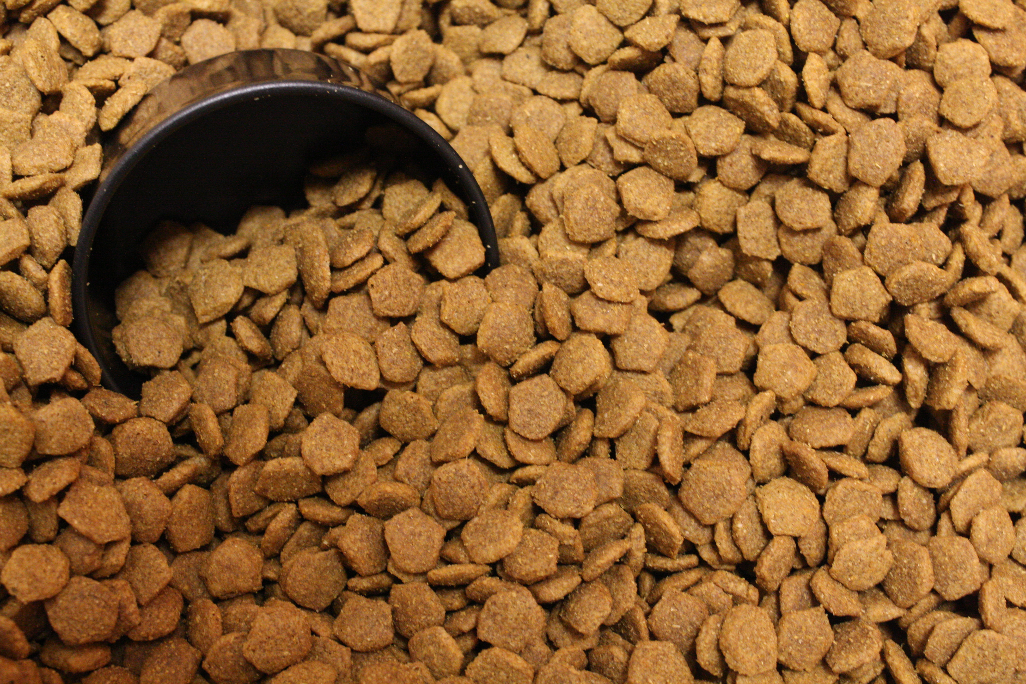 Day 203/365 dog food